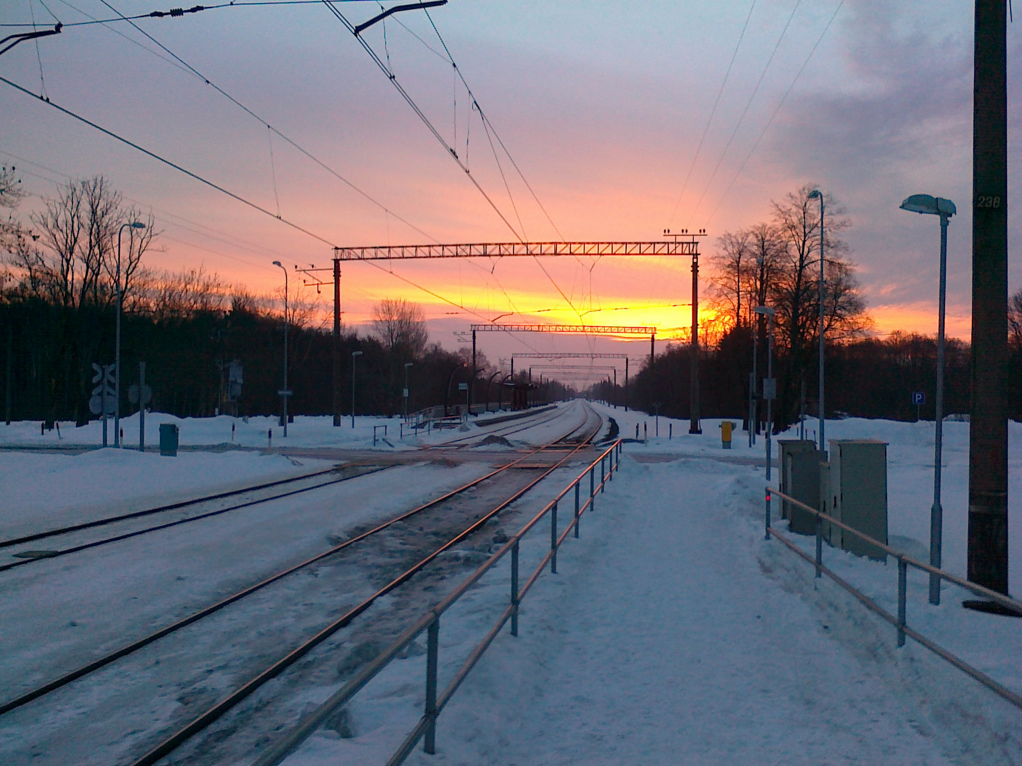 Aruküla raudteepeatus, vaade Tartu suunas, hommik.